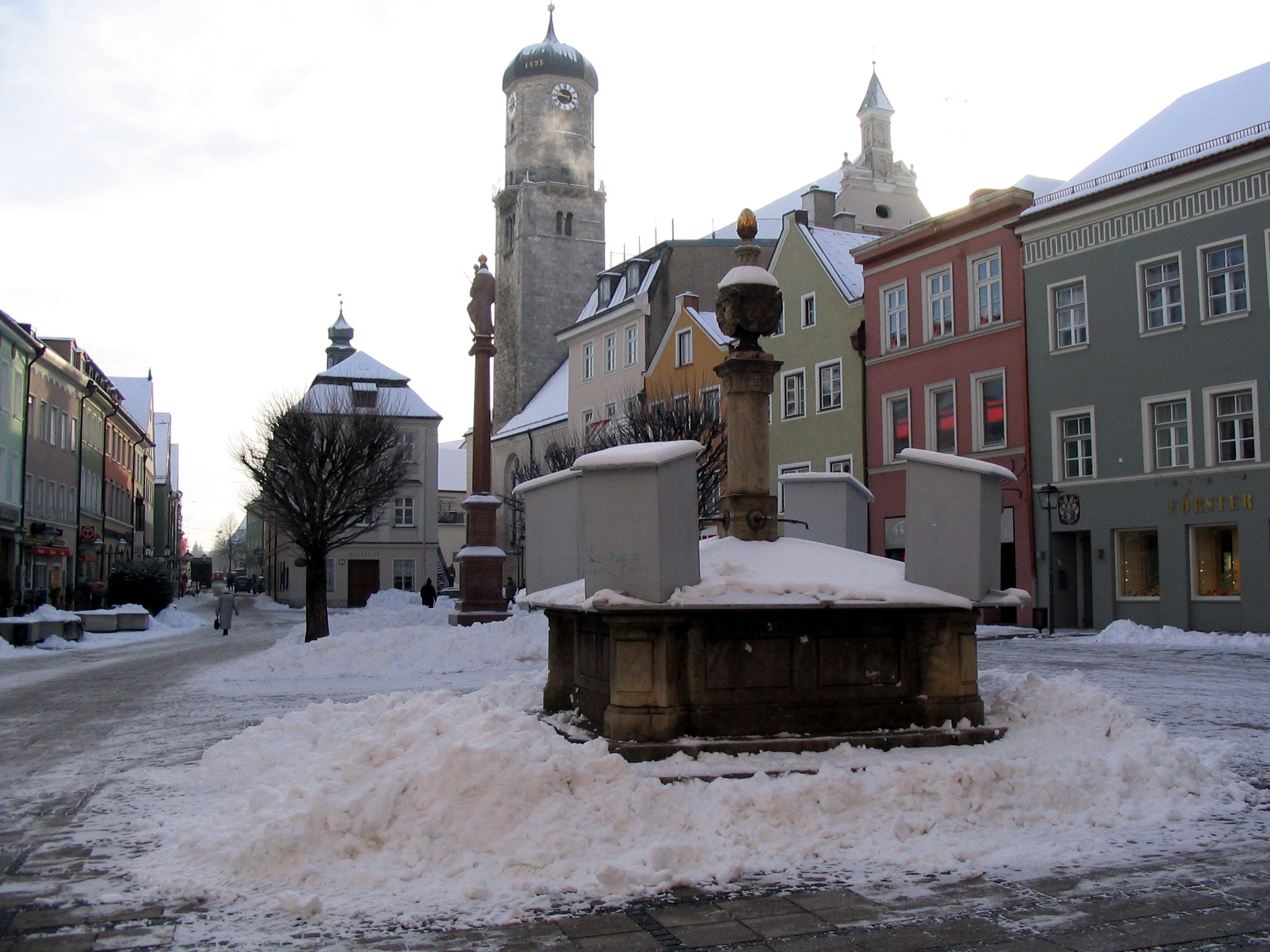 Marienplatz in Weilheim in Oberbayern, Bavaria, Germany.